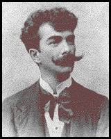 Escritor brasileiro.